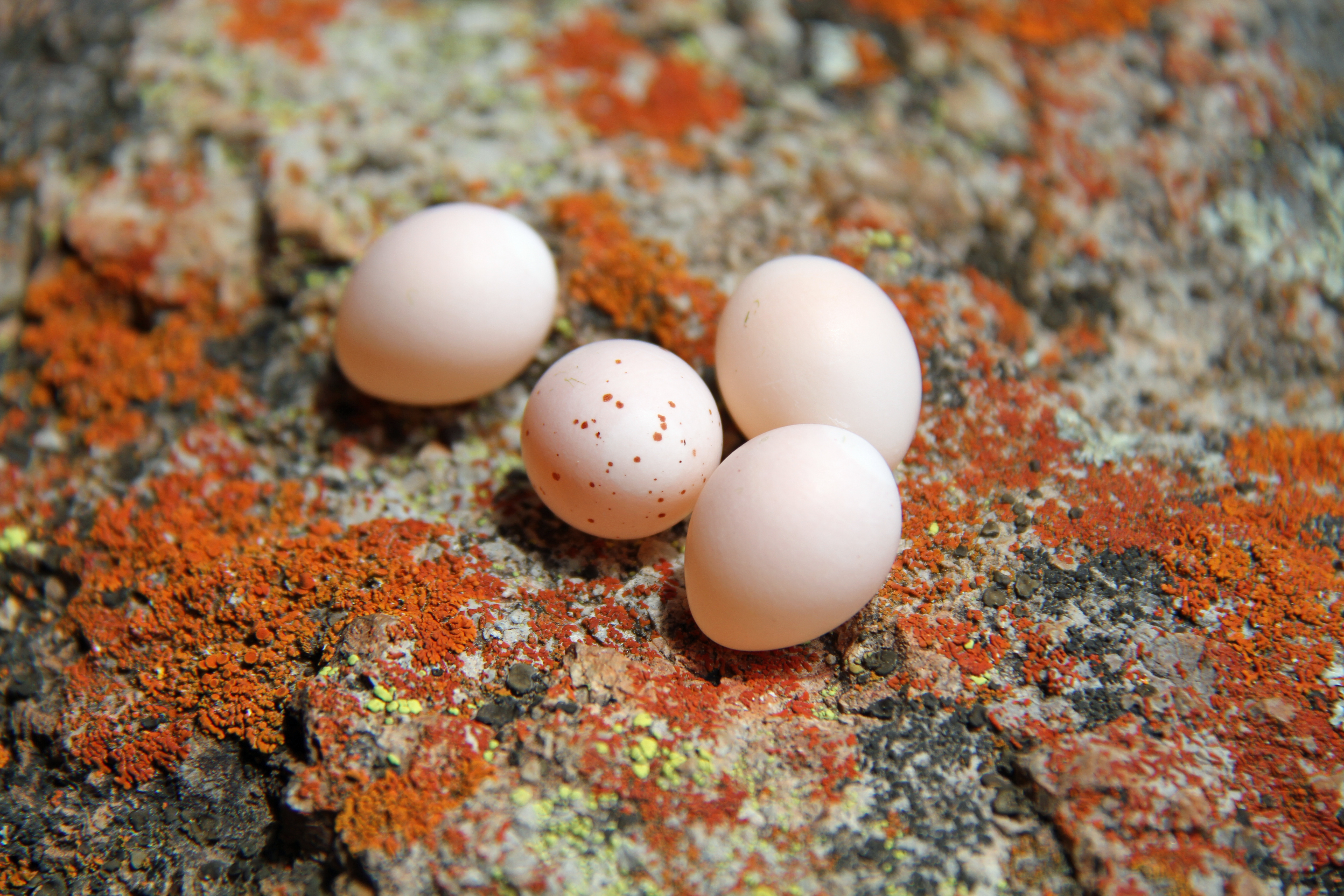 Western Wood Pewee Eggs